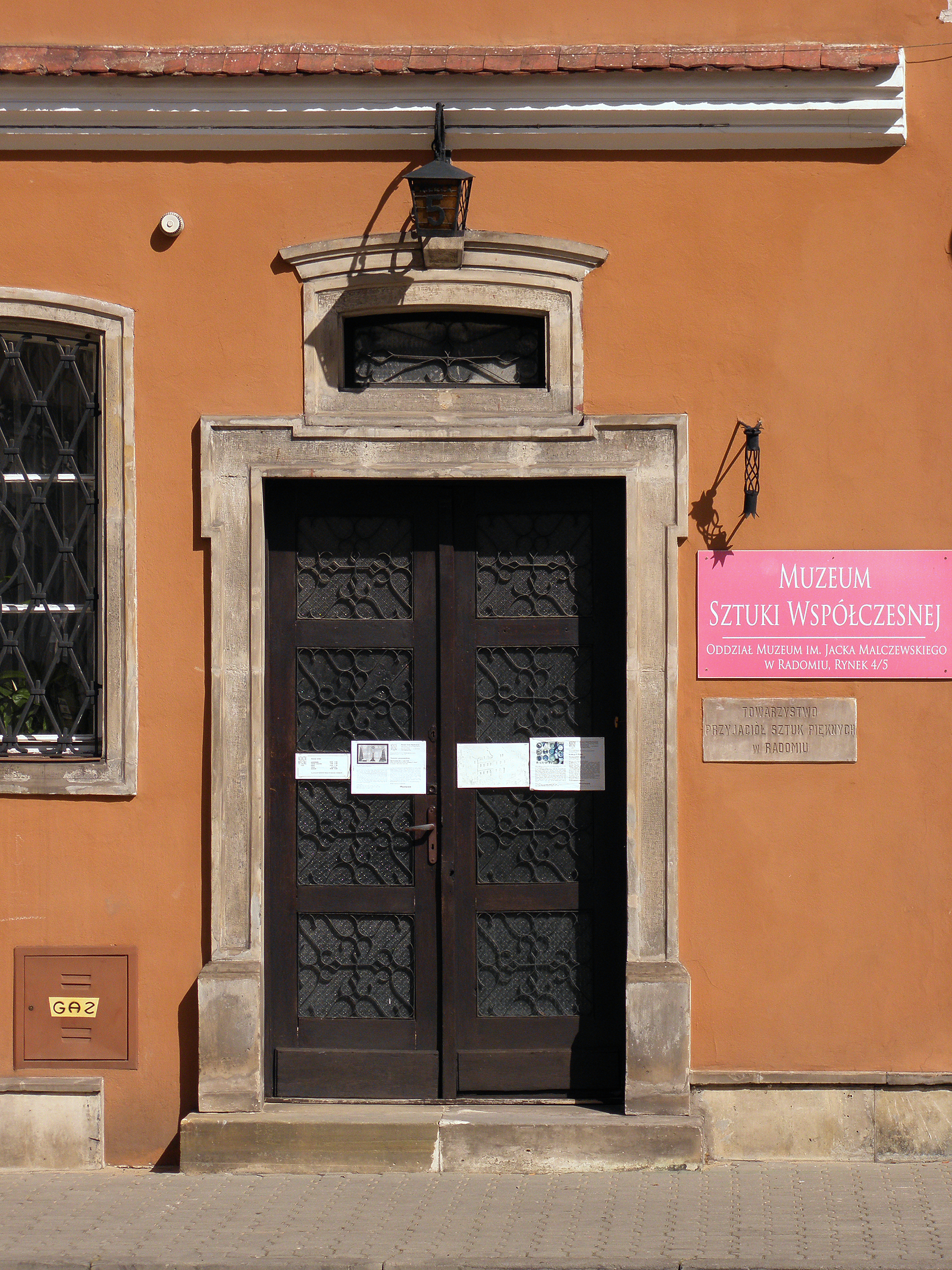 Radom - drzwi kamienicy Rynek 5.